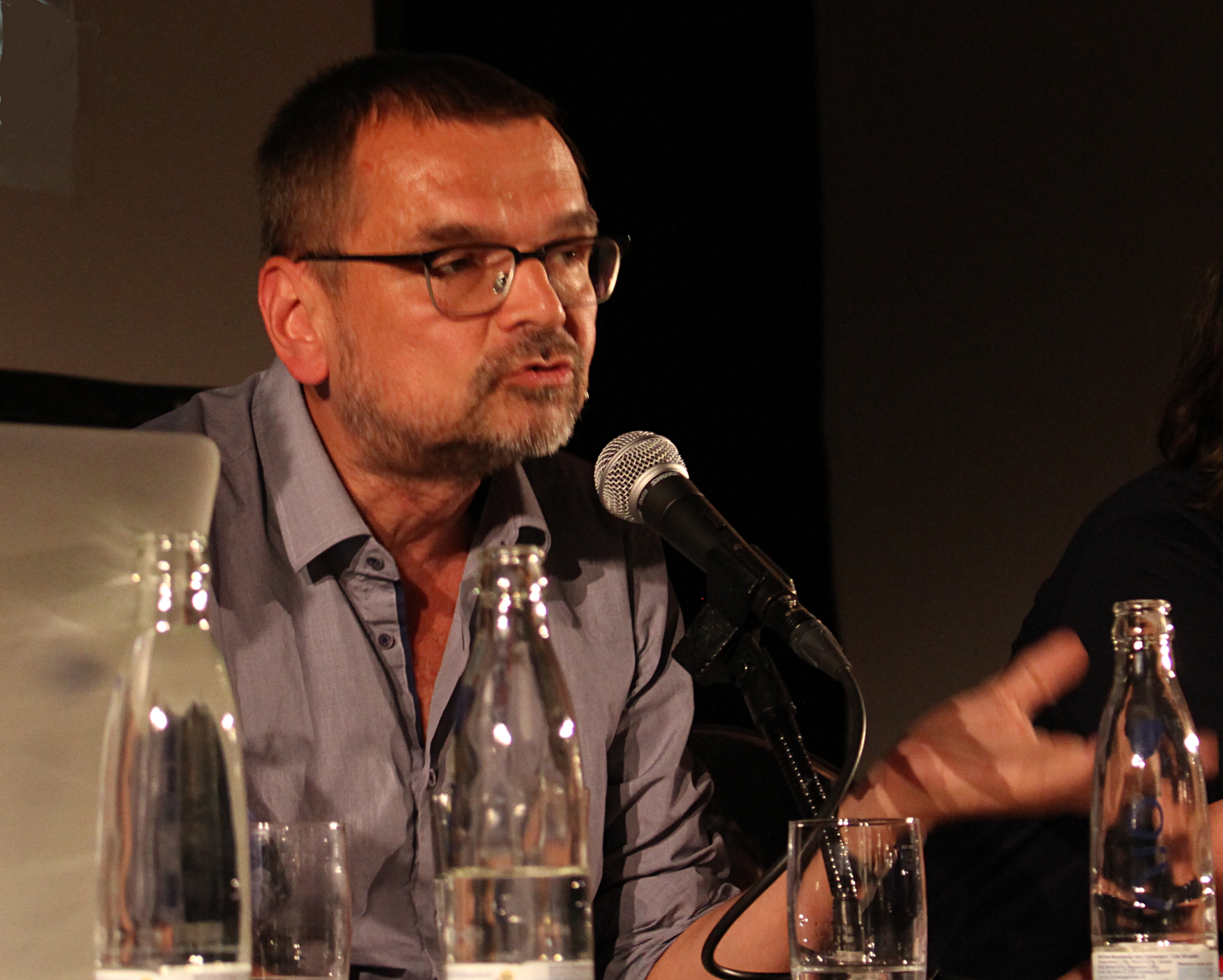 Dietrich Diederichsen im Haus der Kunst, München